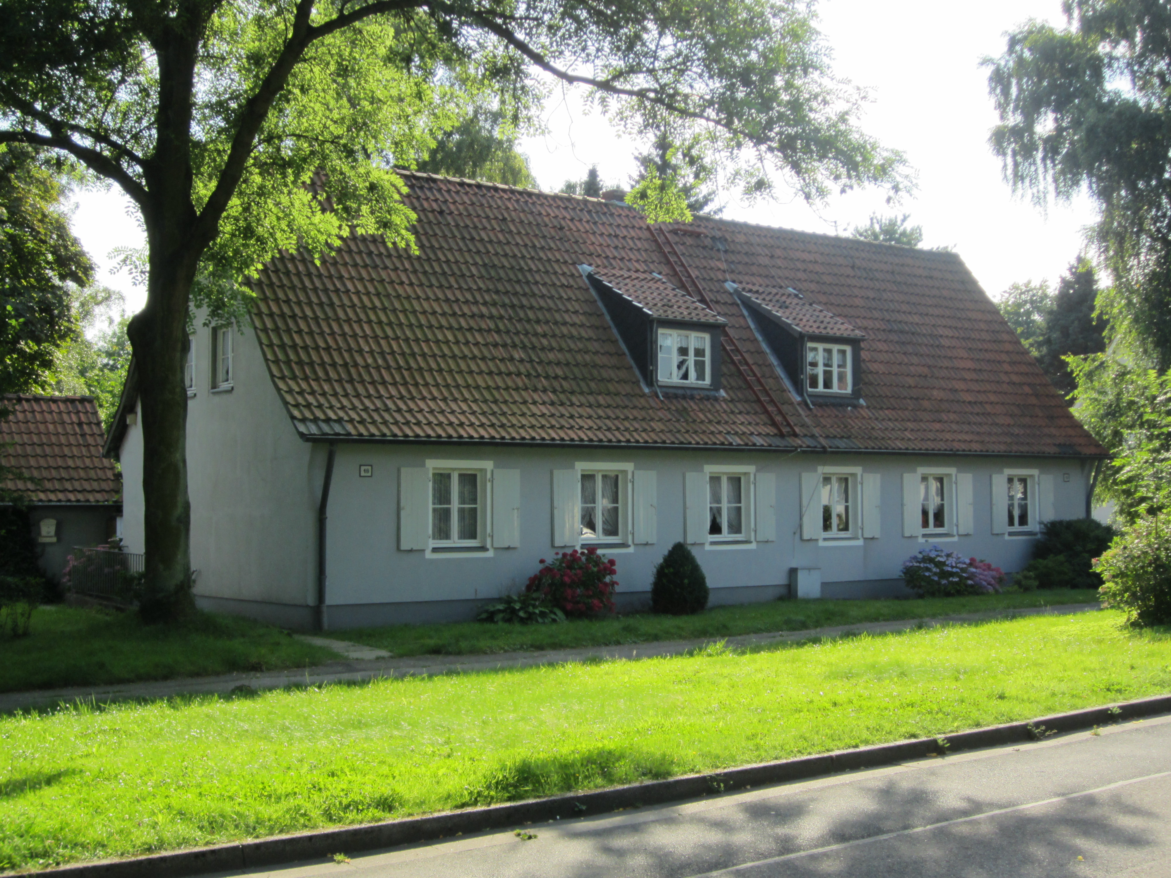 Haus des Pestalozzidorf „Im Grund“; Pestalozzistraße 16 und 18